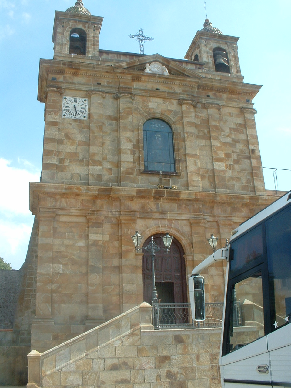 Tagliavia, frazione di Monreale, Santuario Madonna del Rosario.